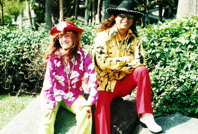 Banda Sonora de la Pelicula La Teta Asustada, Embajadores de la Chicha del Peru.